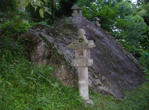 Shaberi-ishi (囀り石, 群馬県吾妻郡中之条町)